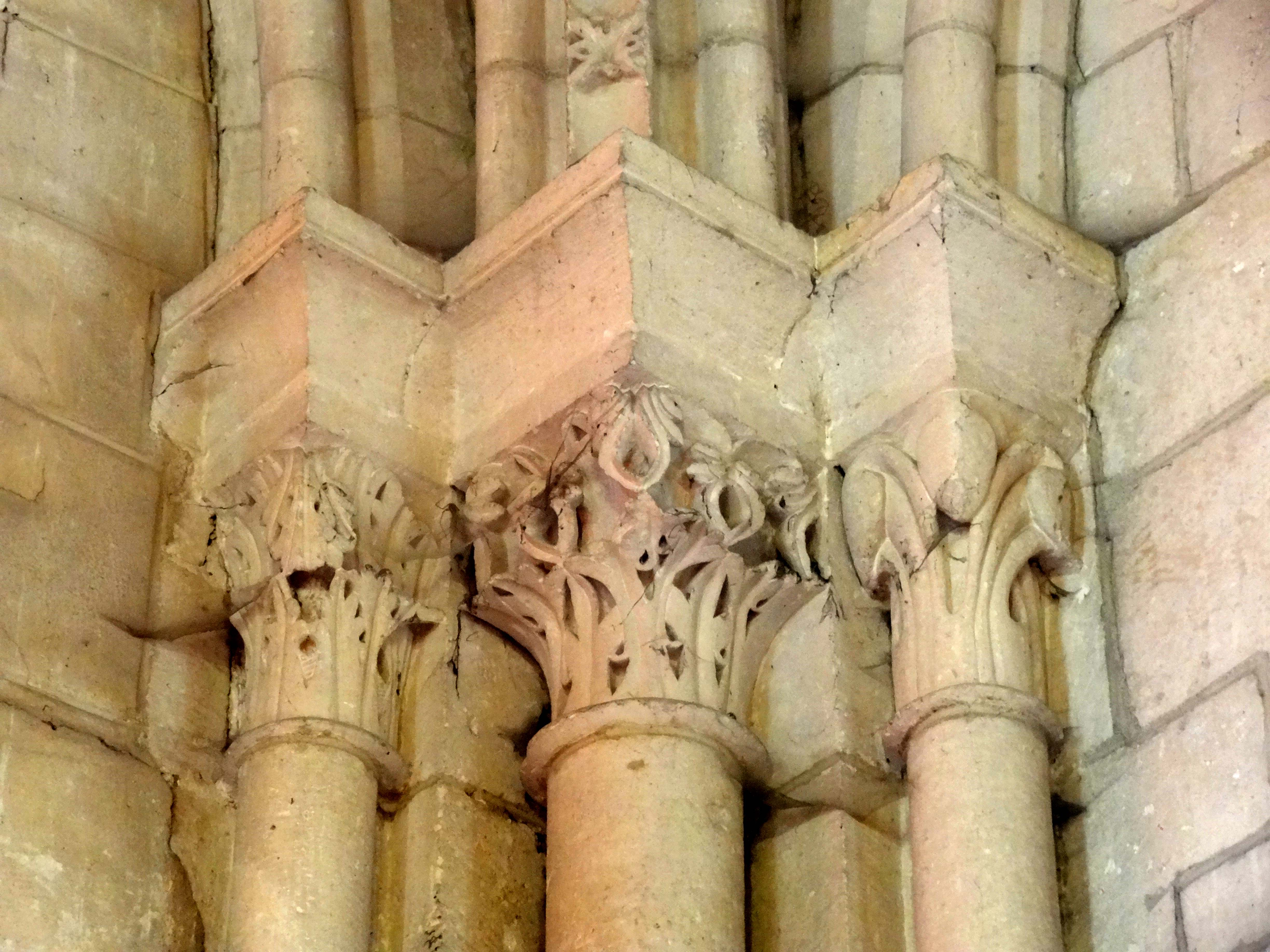 Chapiteaux de l'église - voir titre.